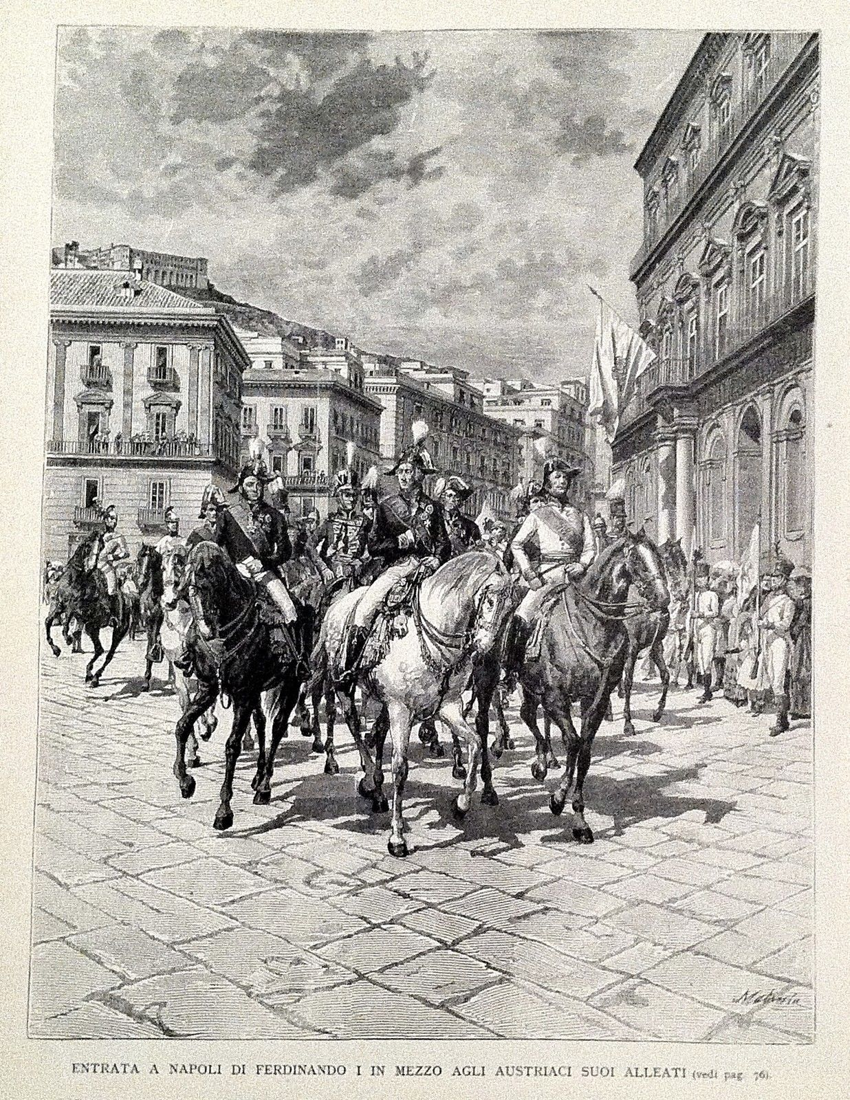 Entrata_a_Napoli_Ferdinando_I_in_mezzo_agli_austriaci.